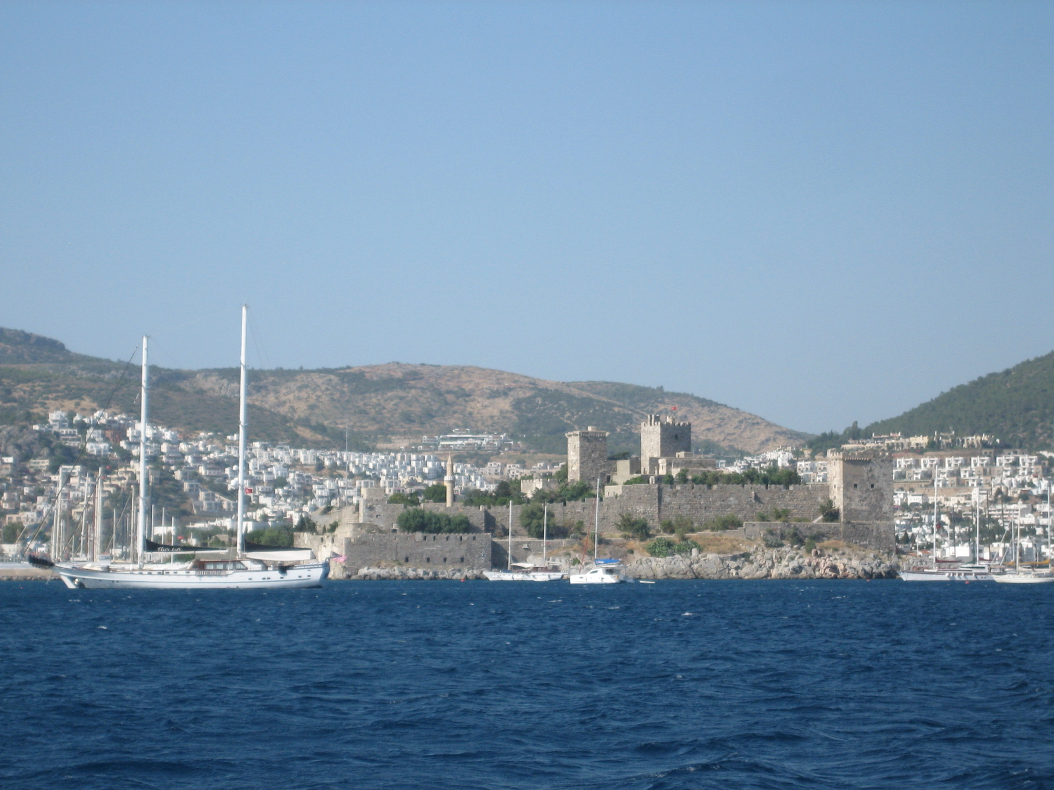 Festung St Péiter zu Bodrum, Juni 2010.